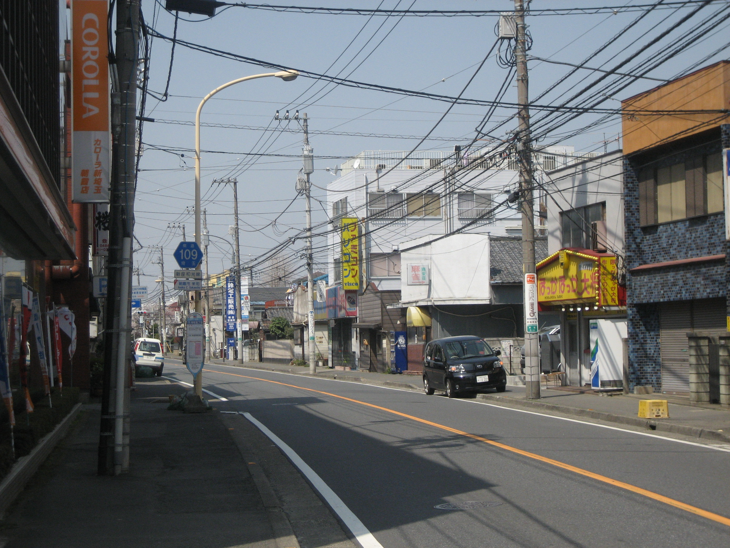 埼玉県道109号朝霞市内